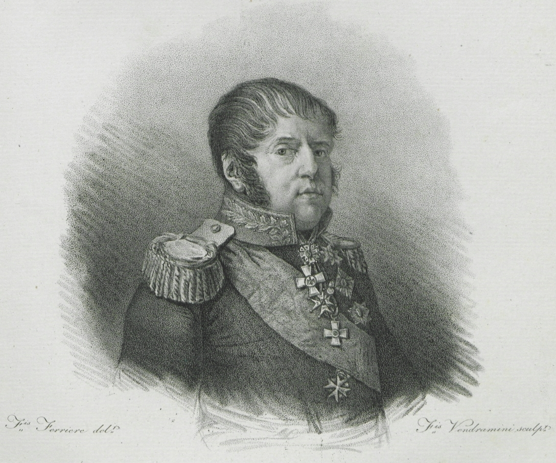 Герцог Александр Фридрих Карл Вюртембергский (нем. Alexander Friedrich Karl von Württemberg, 24 апреля 1771, Мёмпельгард — 4 апреля 1833, Гота) — участник революционных и наполеоновских войн, австрийский и российский генерал от кавалерии, военный губернатор Белоруссии, член Государственного совета. Родной брат императрицы Марии Фёдоровны, дядя Александра I и Николая I.